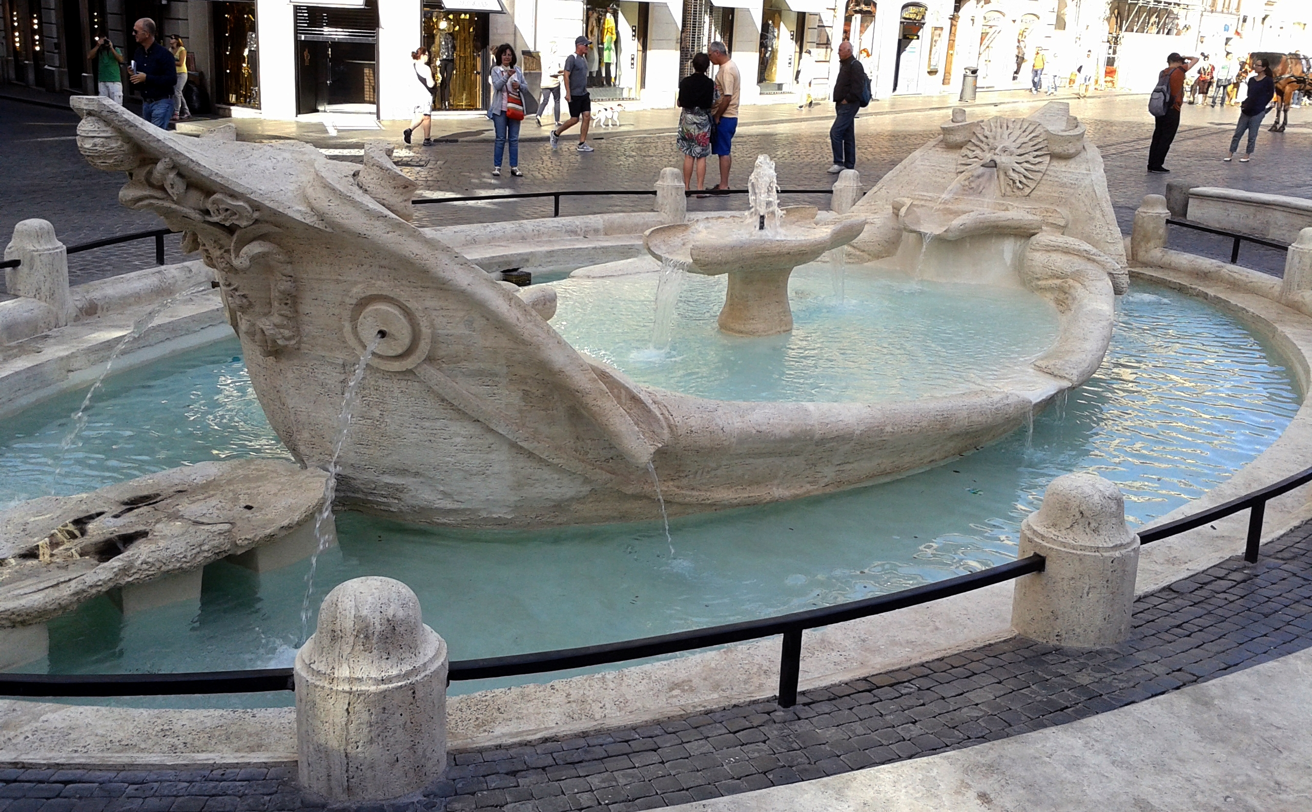 La fontana della Barcaccia subito dopo il restauro del 2014, osservandola da un angolo della Scalinata di Trinità dei Monti